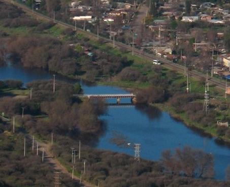 Vista al Estero Tiltil en invierno